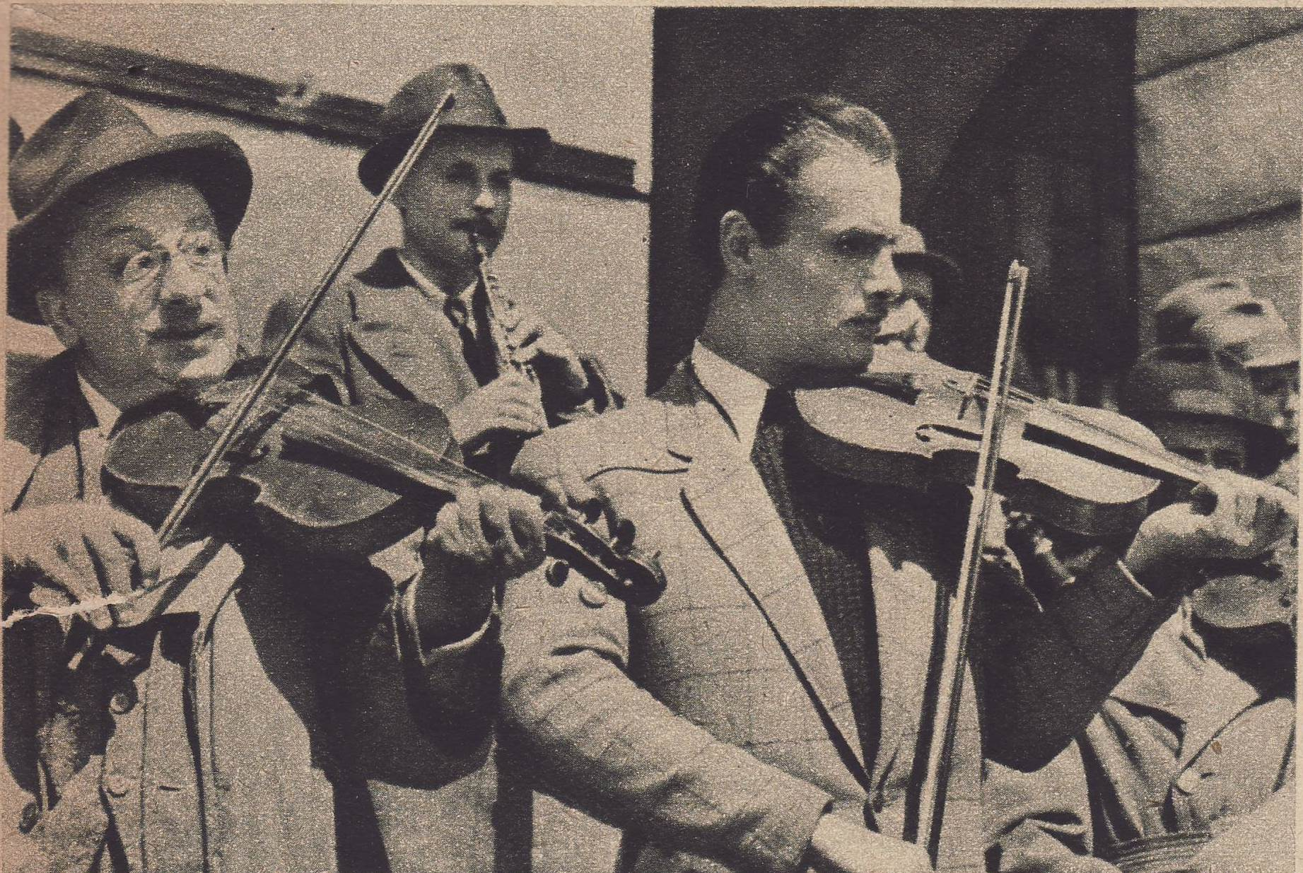 Kadr z filmu fabularnego Zakazane Piosenki nakręconego w 1946 roku w zburzonej Warszawie.